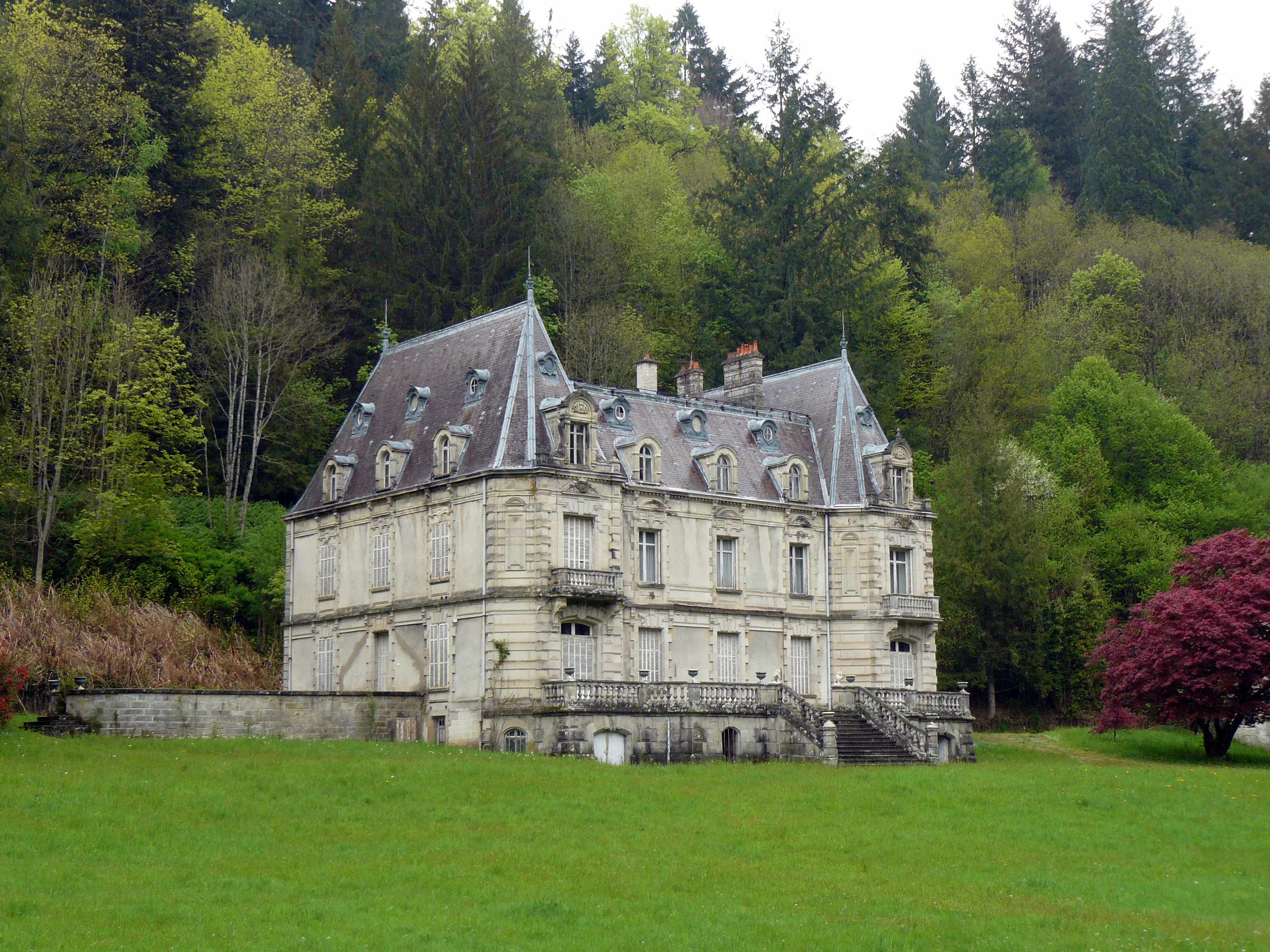 Château de Semouse (Vosges, France)